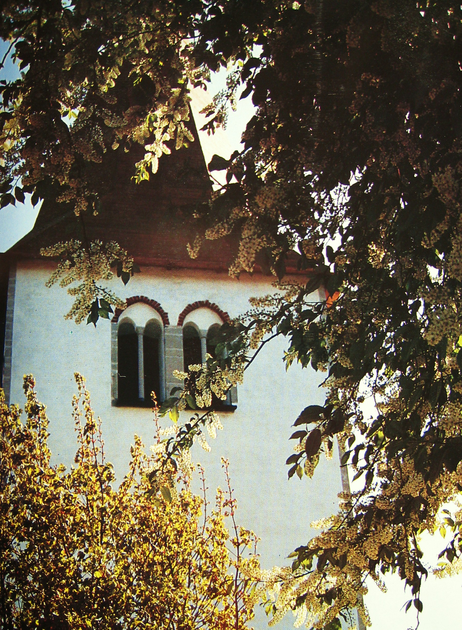 Hangvars kyrka.Tornet med romanska ljudöppningar.